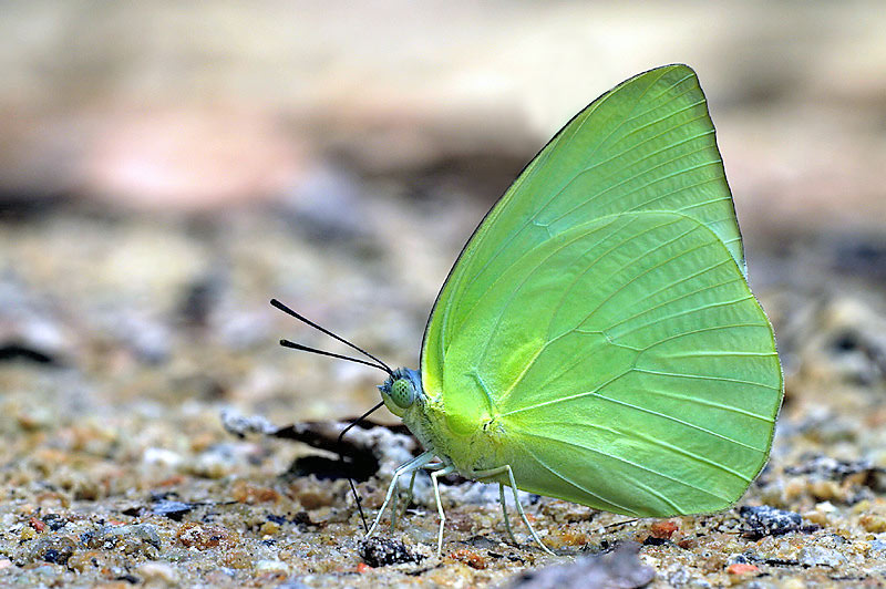 Lemon Emigrant (Catopsilia pomona)